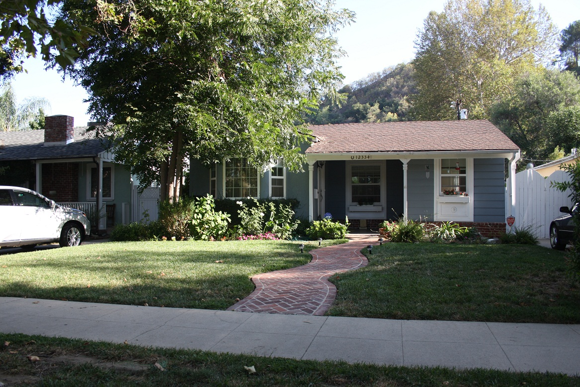 Vue de la maison de Malcolm dans la série Malcolm in the Middle, Los Angeles, États-Unis.